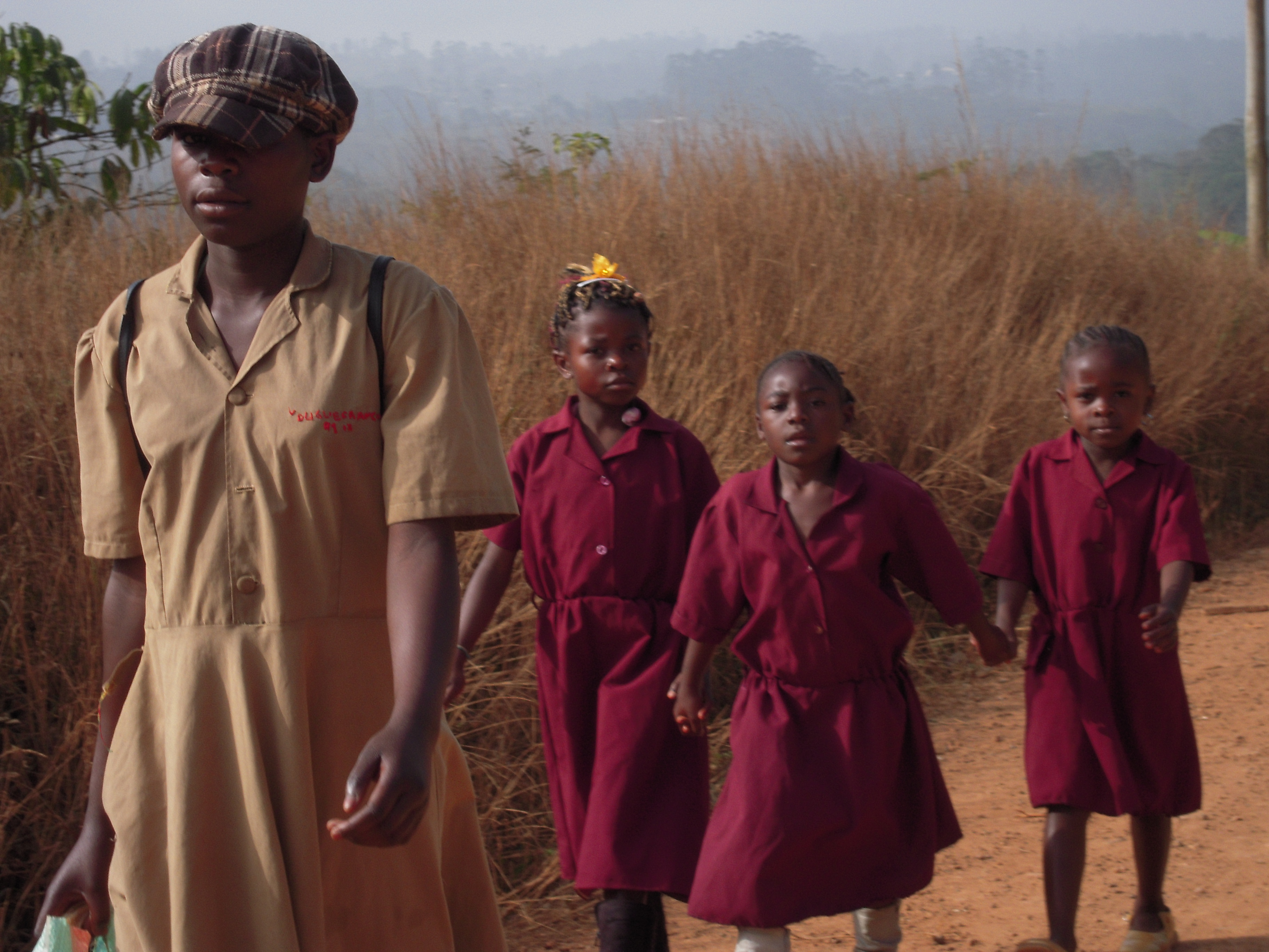 Ecoliers Bamena